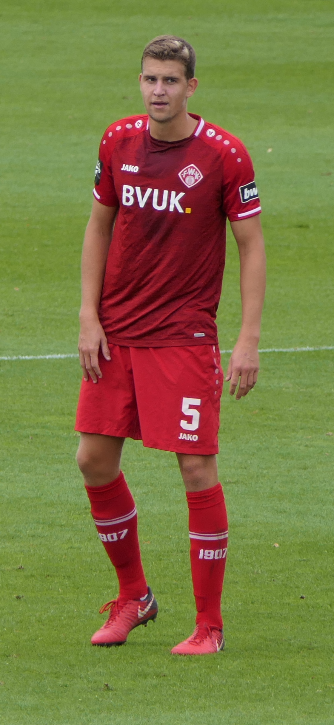 Der Fussballprofi Hendrik Hansen im Trikot der Würzburger Kickers beim Heimspiel gegen Eintracht Braunschweig am 22.09.2018.